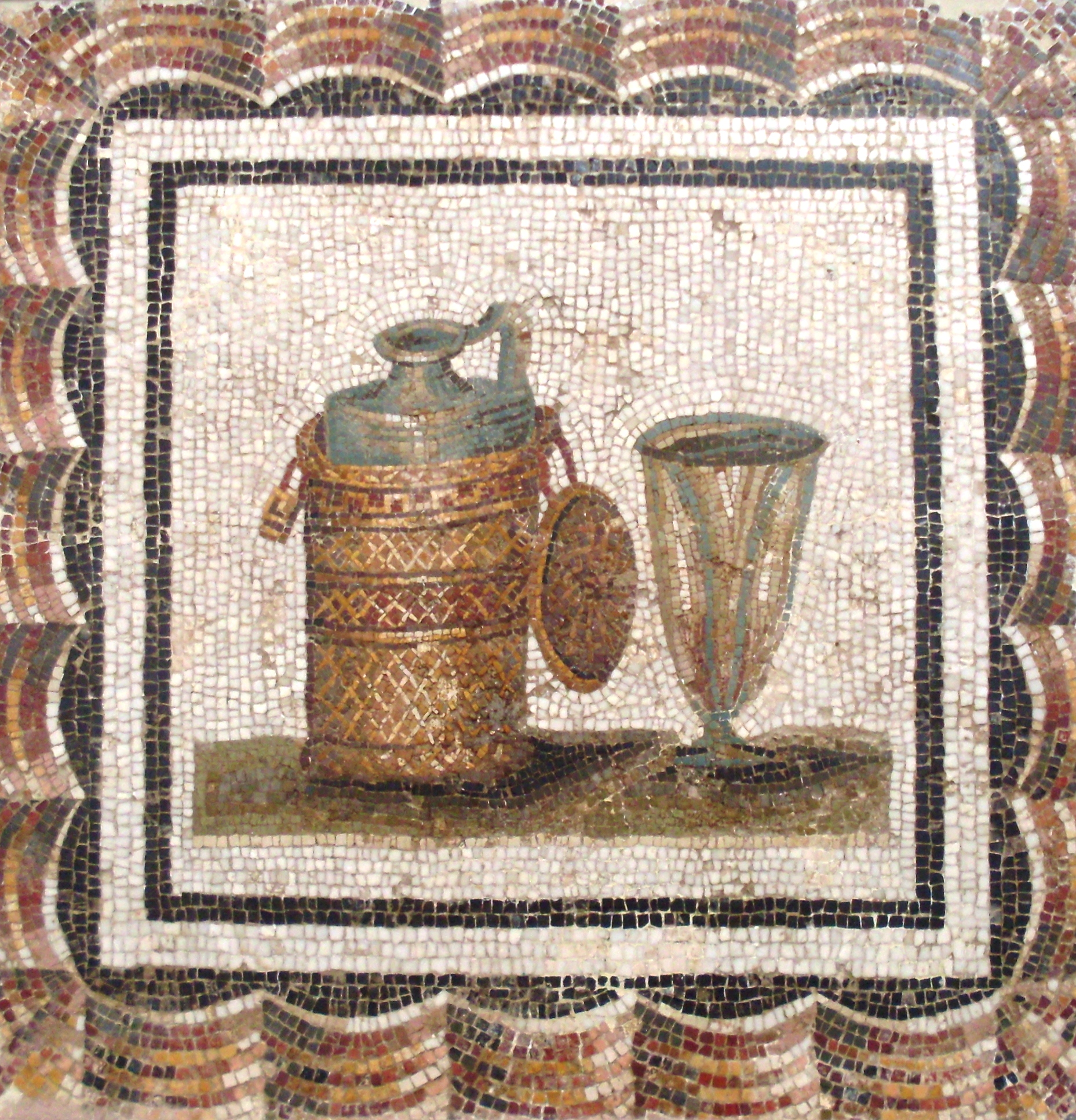 musée de bardo